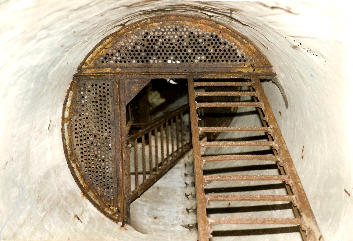 Fort de Boncelles (un des forts de la Position Fortifiée de Liège) : vue intérieure de la tour d'aération (tour aménagée avant la guerre 1940-45).